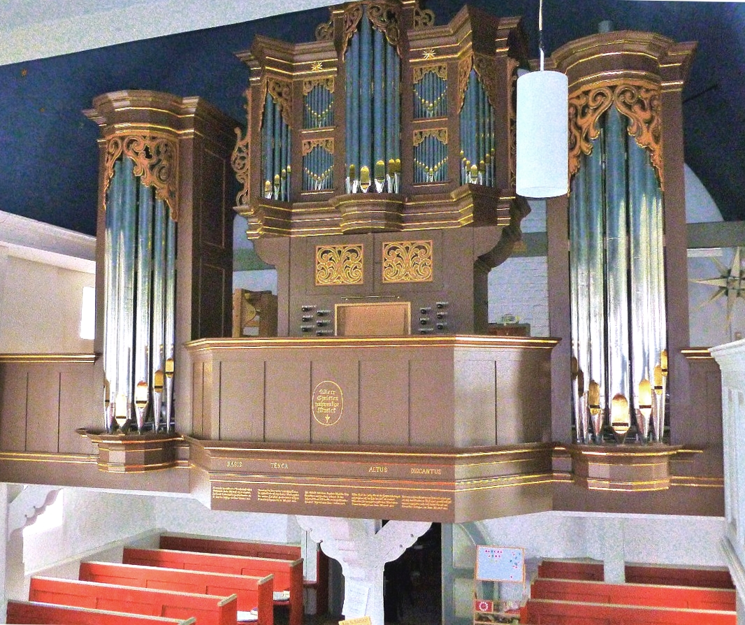 Schnitger-Orgel in Hollern nach der Restaurierung